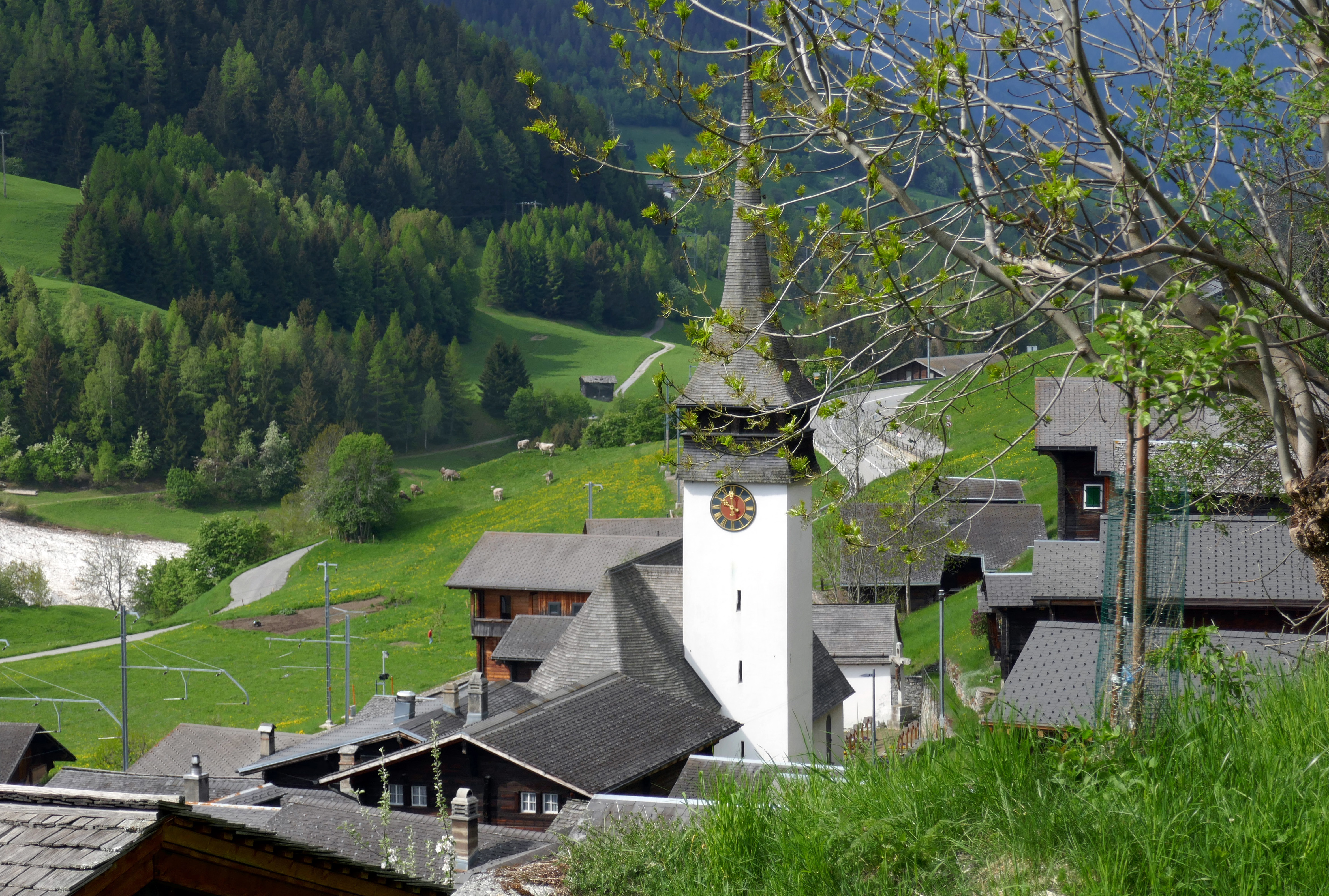 Ort: Niederwald.